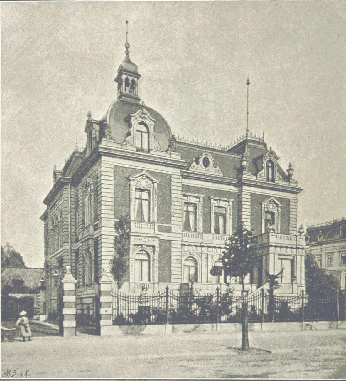 Villa Hilmar Girbardt in der Karl-Tauchnitz-Straße 17 (alte Hausnummer 33) im Leipziger Musikviertel. Erbaut 1888 von Max Pommer Ansicht